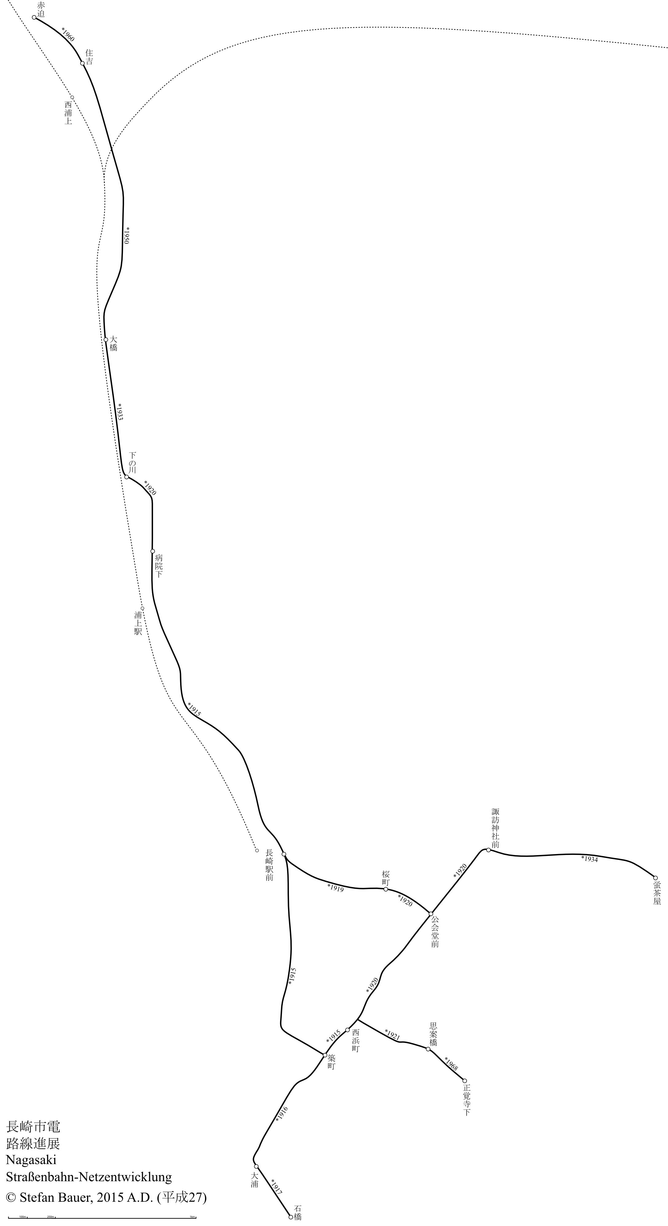 長崎市電の路線進展図